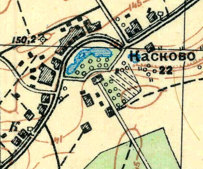 Топографическая карта Ленинградской области, квадрат О-35-24-А-а (Клясина), деревня Каськово